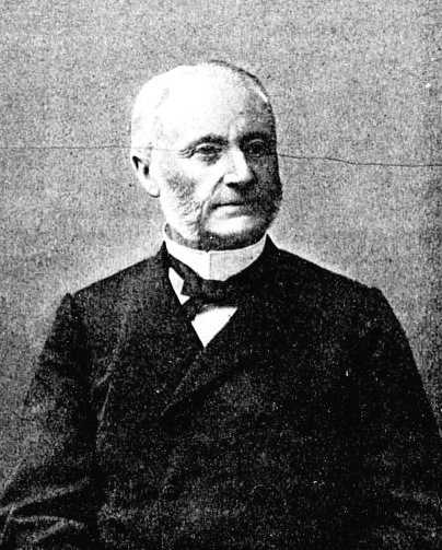 "M. Barboux"